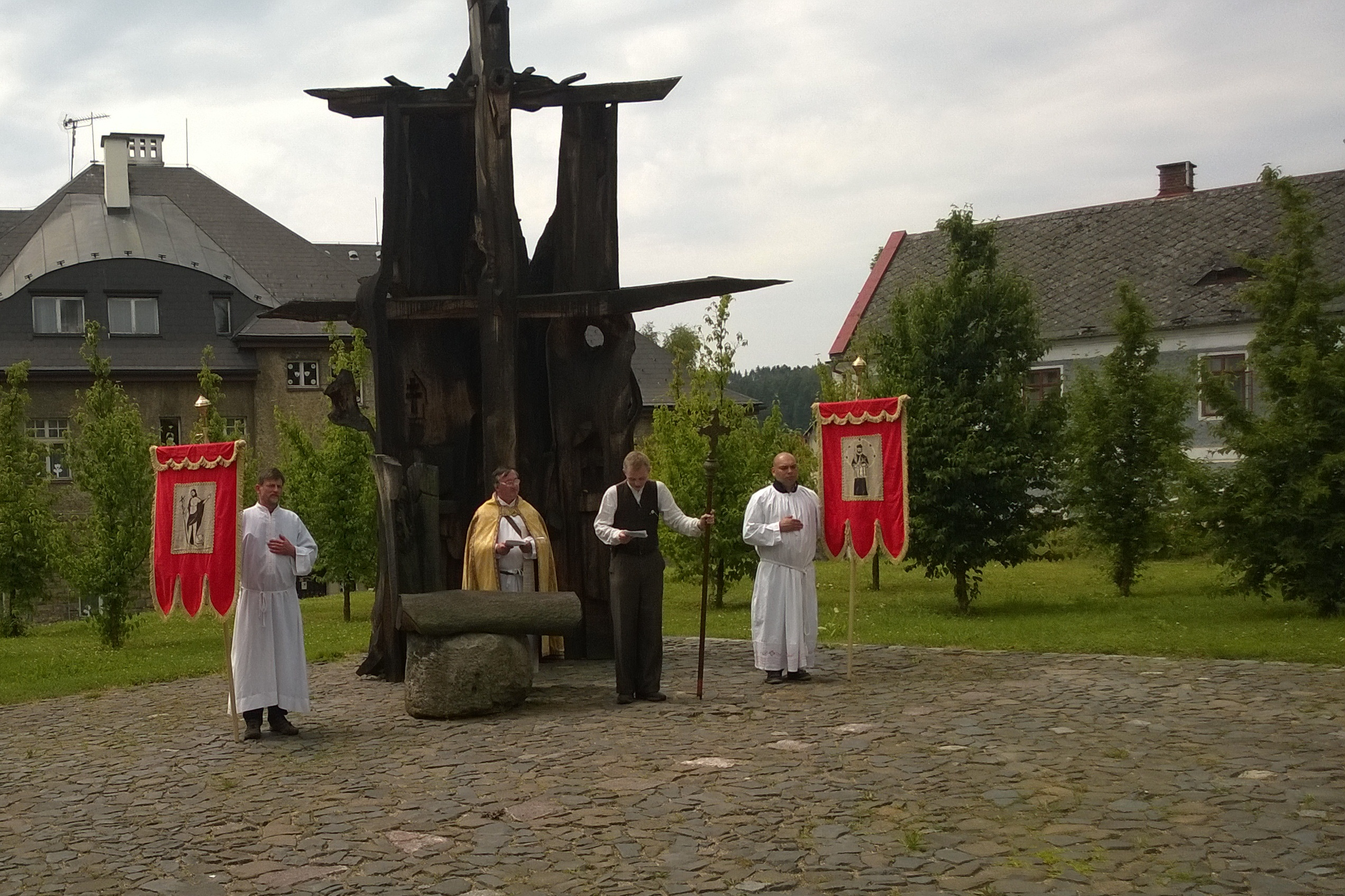 Počátek poutě mezi dvěma Jány 2014 na místě bývalé rajské zahrady johanitské komendy. Uprostřed českodubský duchovní správce R. D. Miroslav Maňásek a Jan Havelka, předseda spolku Dubáci.